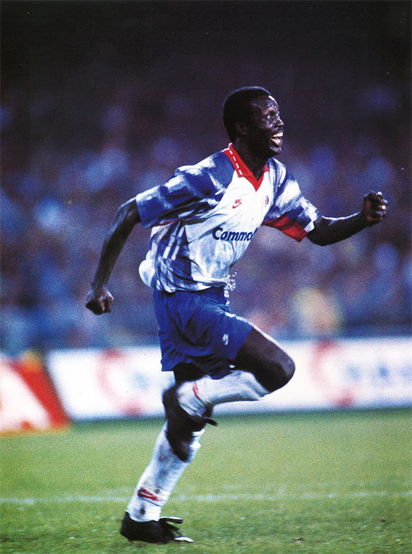 Napoli, stadio San Paolo, 21 ottobre 1992. L'attaccante liberiano George Weah esulta dopo uno dei suoi due gol che decisero la sfida tra e (0-2) valevole per l'andata dei sedicesimi di finale della Coppa UEFA 1992-1993. Licensing 1992 10 21